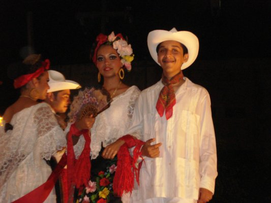 Traje jarocho típico del estado de Veracruz